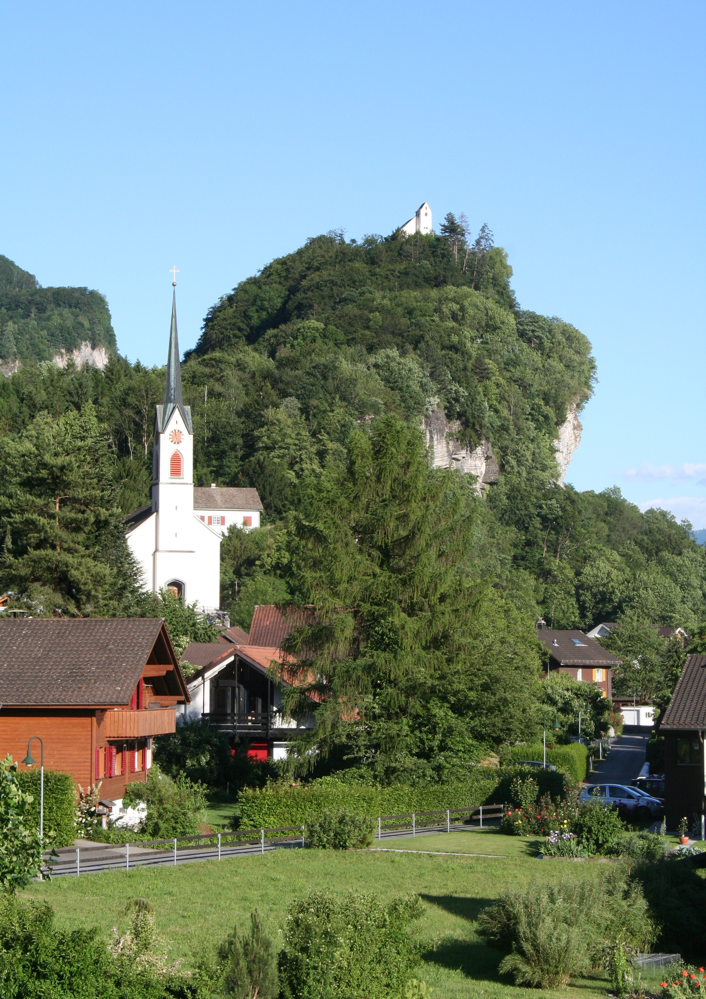 Dorfkirche Walenstadt-Berschis, hinten die St. Georgs-Kapelle, die älteste zweischiffige Kirche der Schweiz.